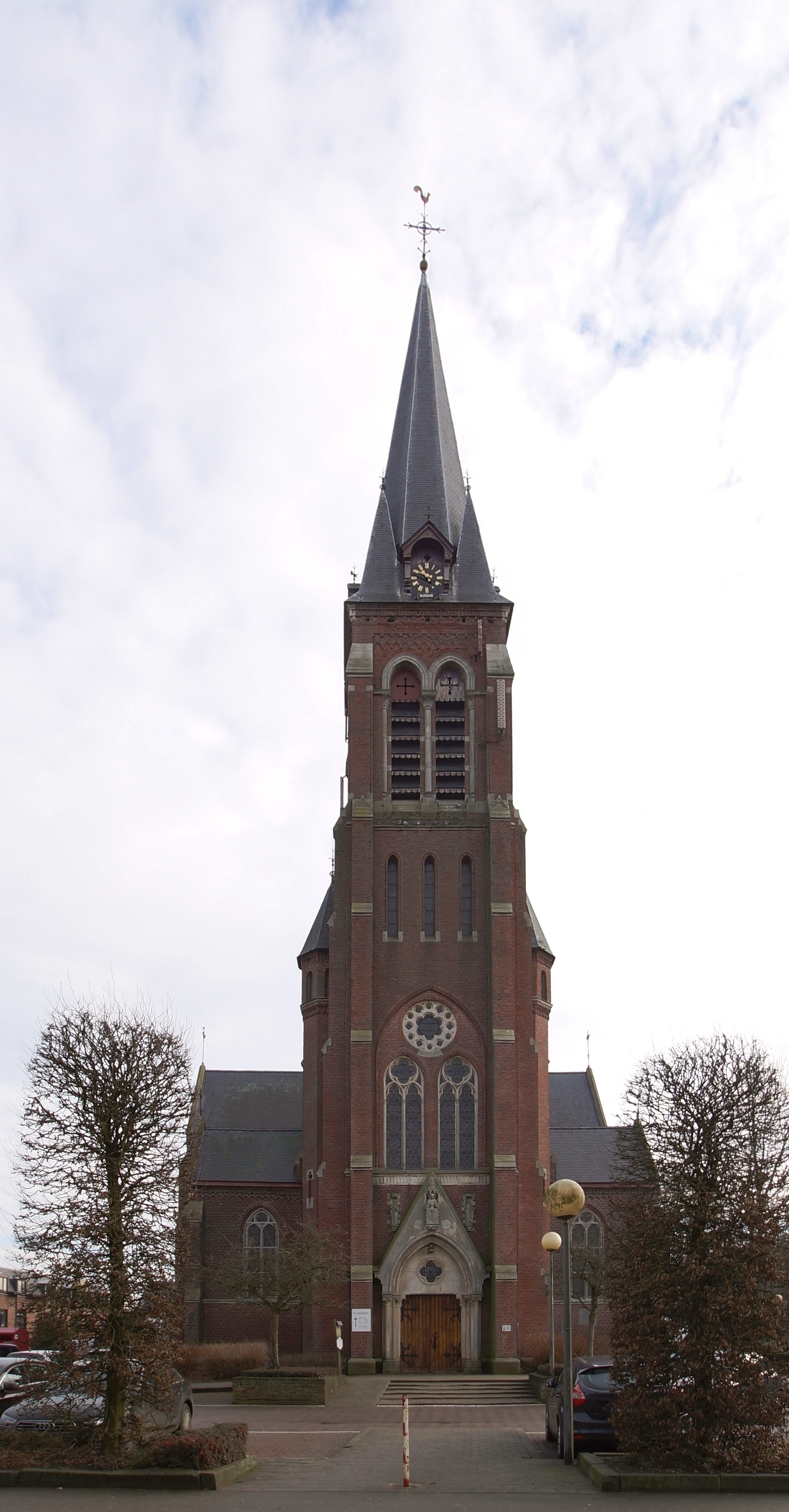 Sint-Willibrorduskerk (Merksplas) - Vooraanzicht